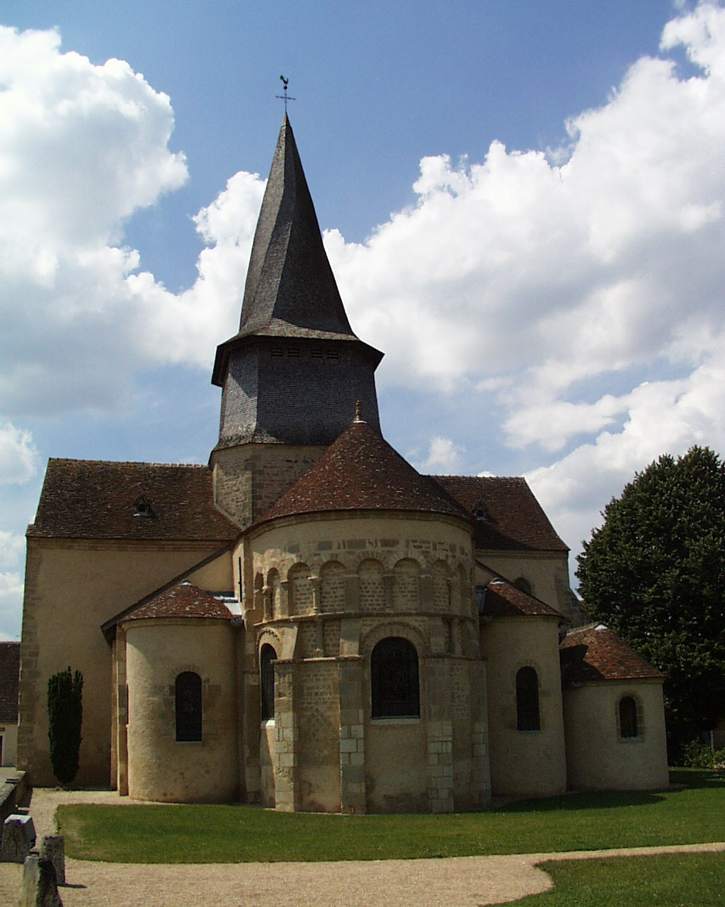 Photo de l'église de Saint-Outrille dans le Cher prise en juin 2001 par Accrochoc avec un appareil photo numérique Camedia 1400 de marque Olympus, visée reflex, 1,4Mega pixels.